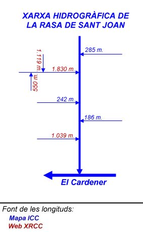 Mapa esquemàtic de la xarxa hidrogràfica de la Rasa de Sant Joan, a Olius, (Solsonès).